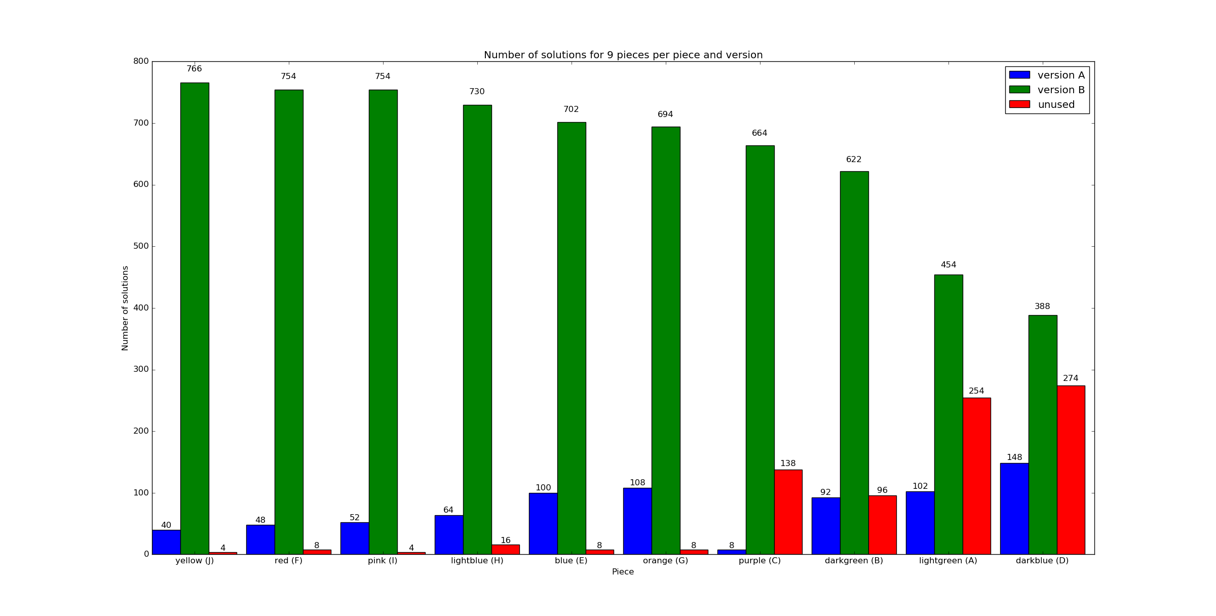 A graph showing the number of solutions using nine pieces per piece and version for the puzzle game IQFit.